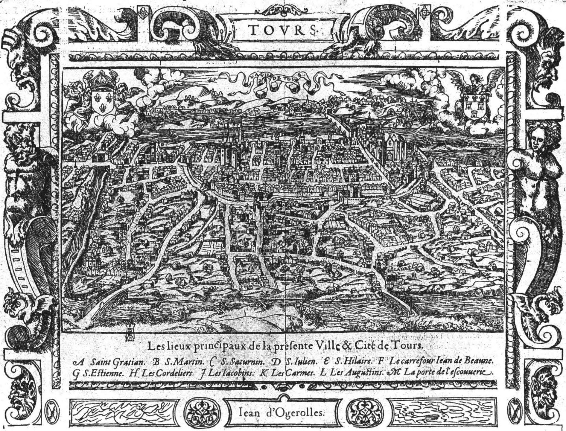 Vue de Tours médiévale. Gravure sur bois qui date du milieu du XVIe siècle et aurait pu être réalisée par Bernard Salomon. Mesurant 27,5 x 36 cm, elle est intitulée " Le vif pourtrait de la noble ville et cité de Tours ", une expression qui rappelle la double origine de l'agglomération. On la trouve dans l'Epitome de la corographie d'Europe, illustré de pourtraitz des villes plus renomées (sic) d'icelle, mis en françoys par Guillaume Guéroult, publié à Lyon chez Balthazar Arnoullet en 1553 mais cet exemplaire a été édité en 1564 par un autre imprimeur lyonnais, Jean d'Ogerolles